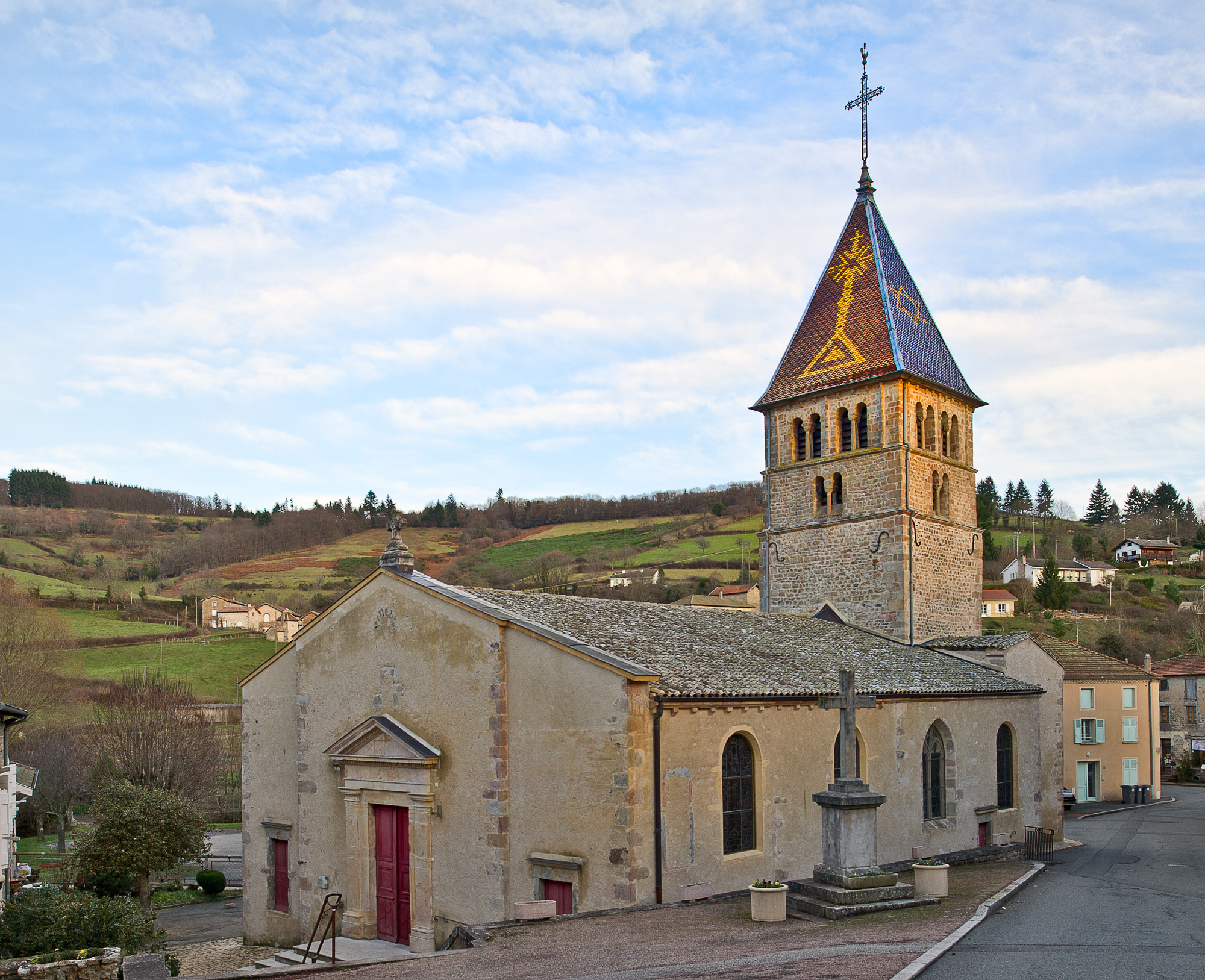 Église Saint-Antoine d'Ouroux, (ClasséInscrit, 19821982) .